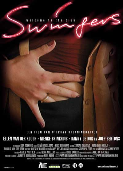 Offizielles Poster des Films